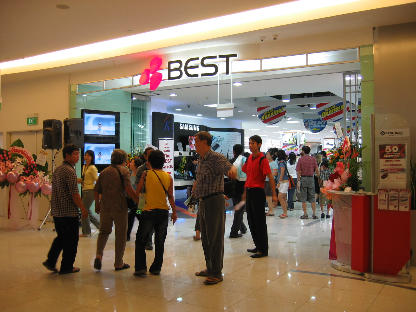 Best Denki at VivoCity, Singapore.